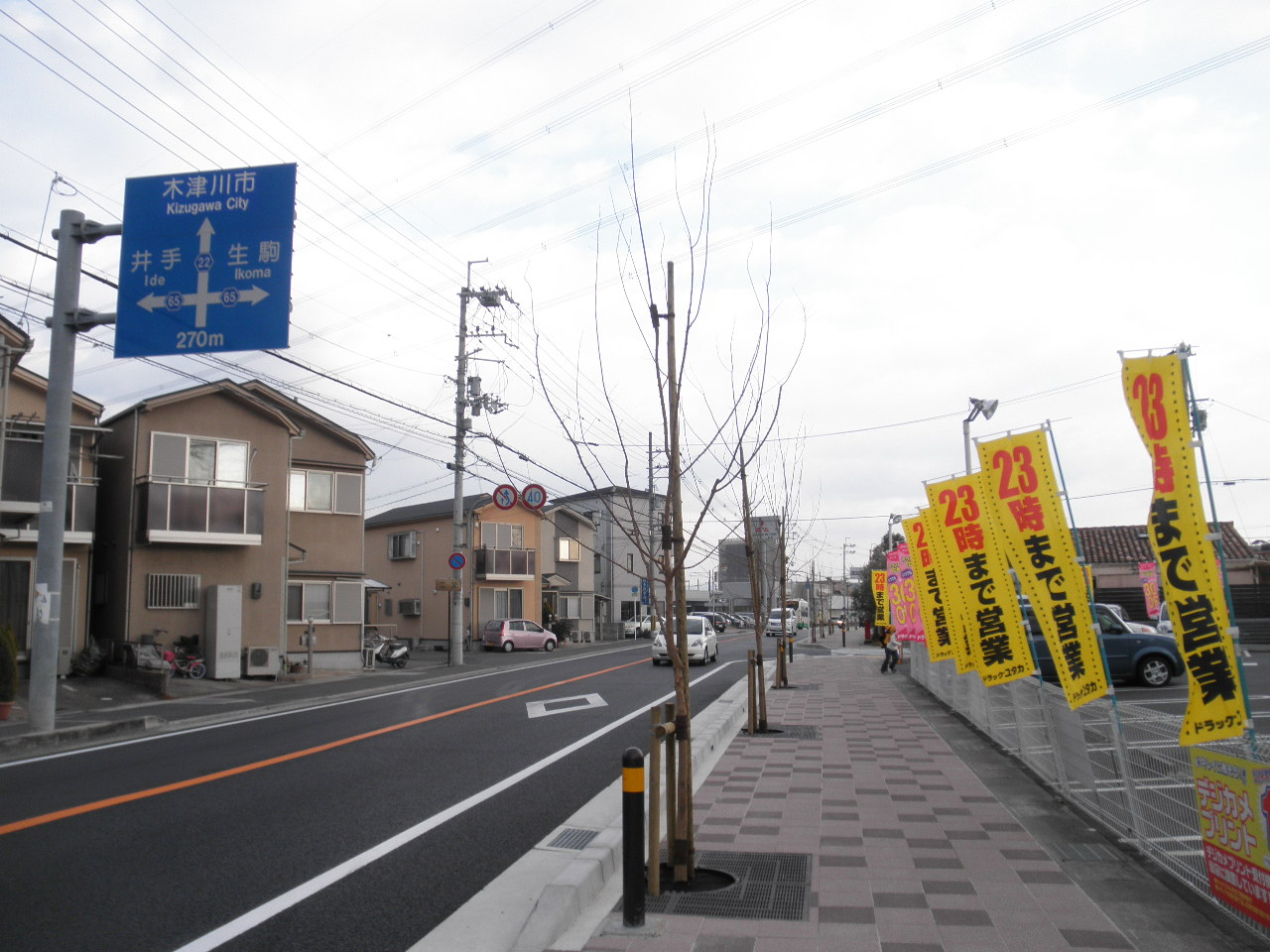 京都府京田辺市三山木田中 京都府道22号八幡木津線